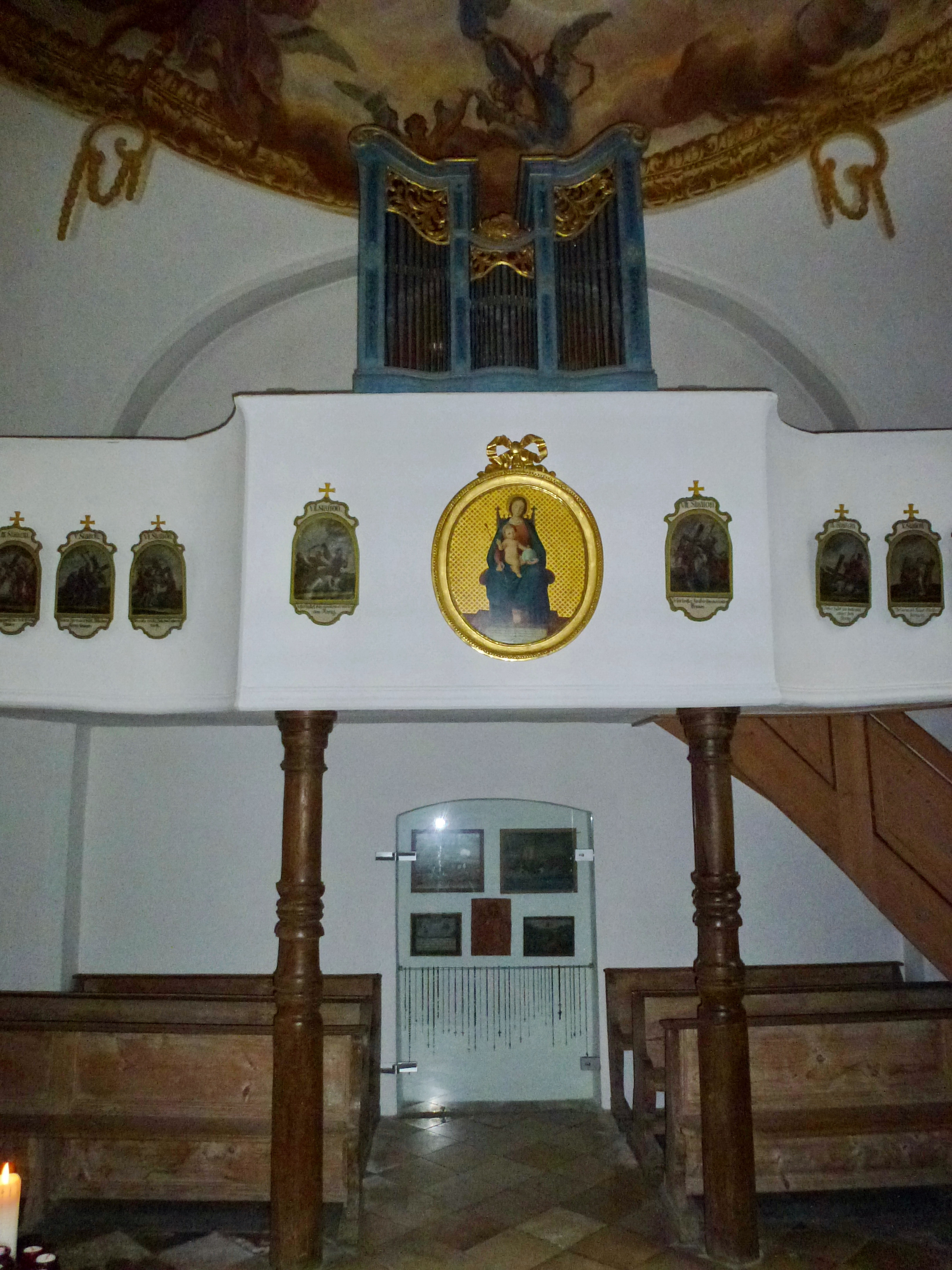 Weßling_Grünsink 2: Katholische Wallfahrtskapelle Maria Hilf, Empore mit Orgelprospekt (Orgel von Joseph Gloner, München, 1780)